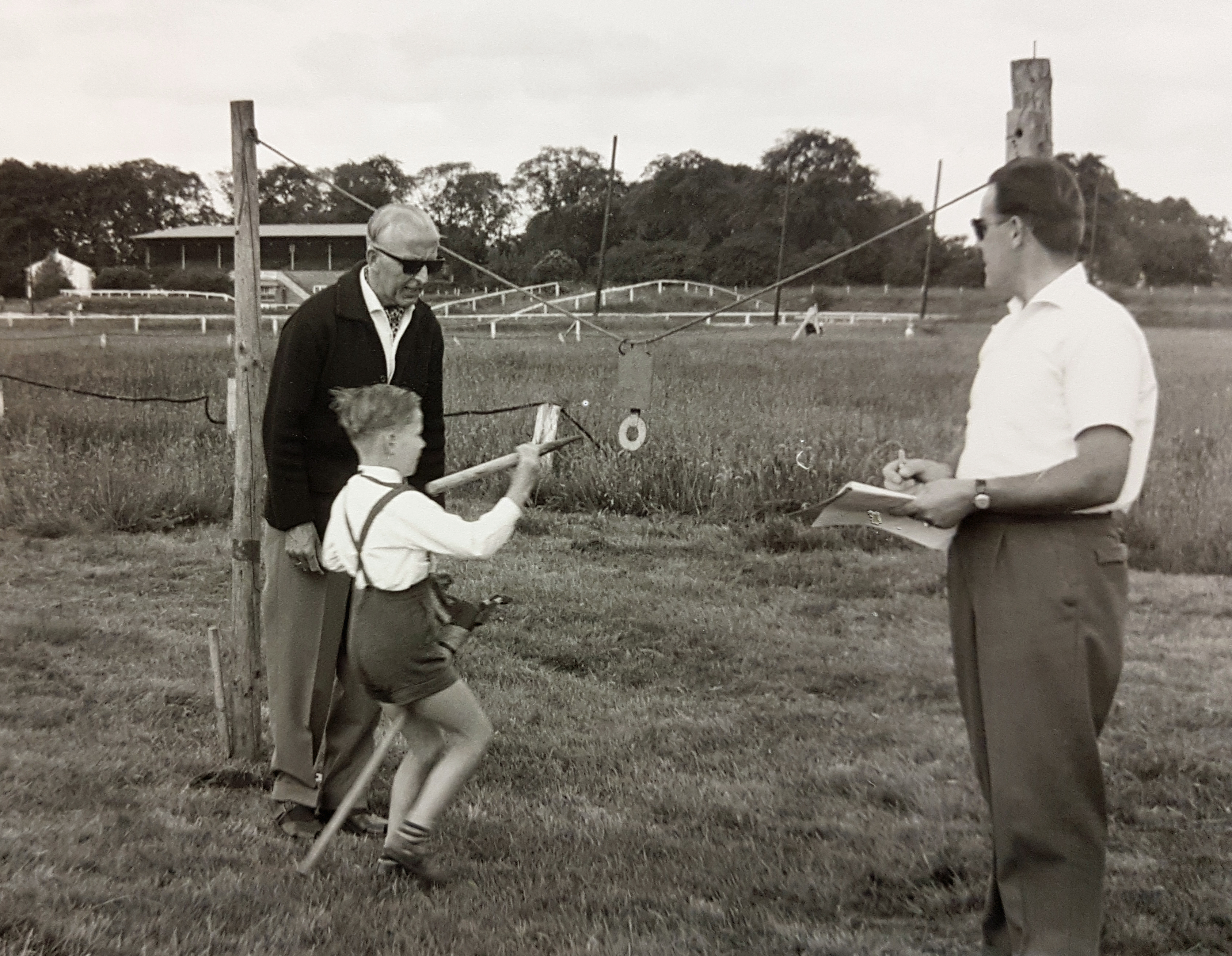 Ein kleiner Junge bei einem der Spiele des Kindervogelschießens in Heide. Hier übt er sich im Ringereiten auf dem Steckenpferd